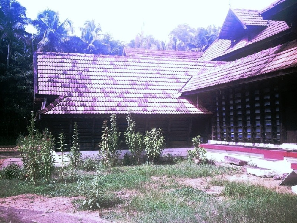 കിഴക്കേ നാലമ്പലം-പെരുംതൃക്കോവിൽക്ഷേത്രം, പിറവം